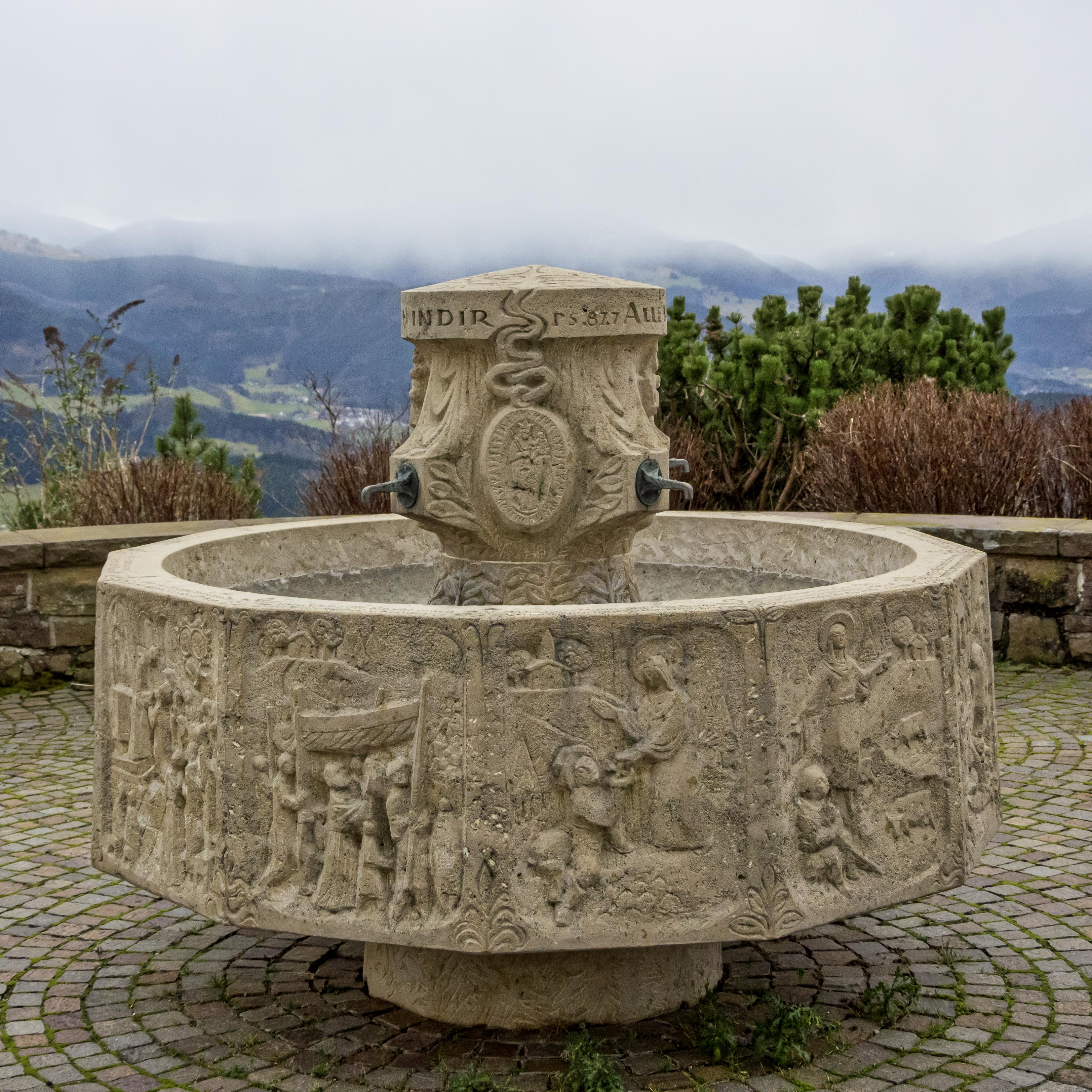 Bilder von der Wallfahrt Maria Lindenberg Brunnen vor der Wallfahrtskirche Maria Lindenberg